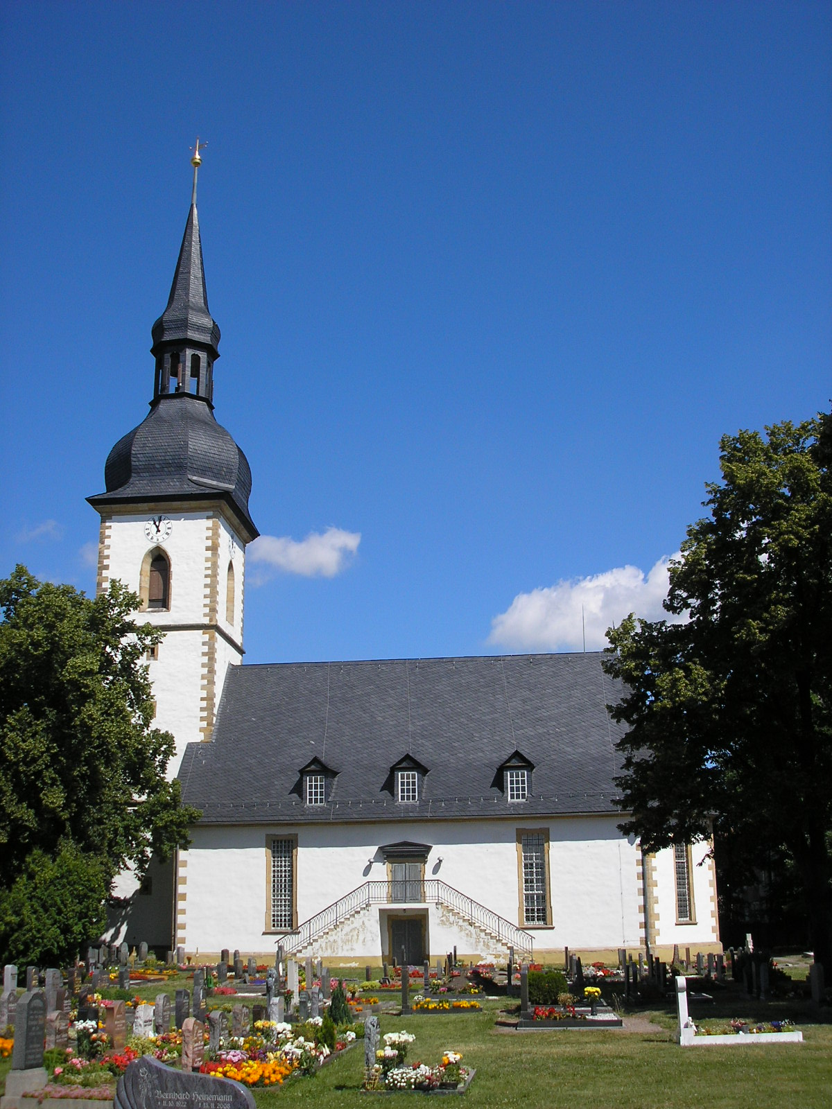 Die Dorfkirche von Stotternheim (Thüringen).